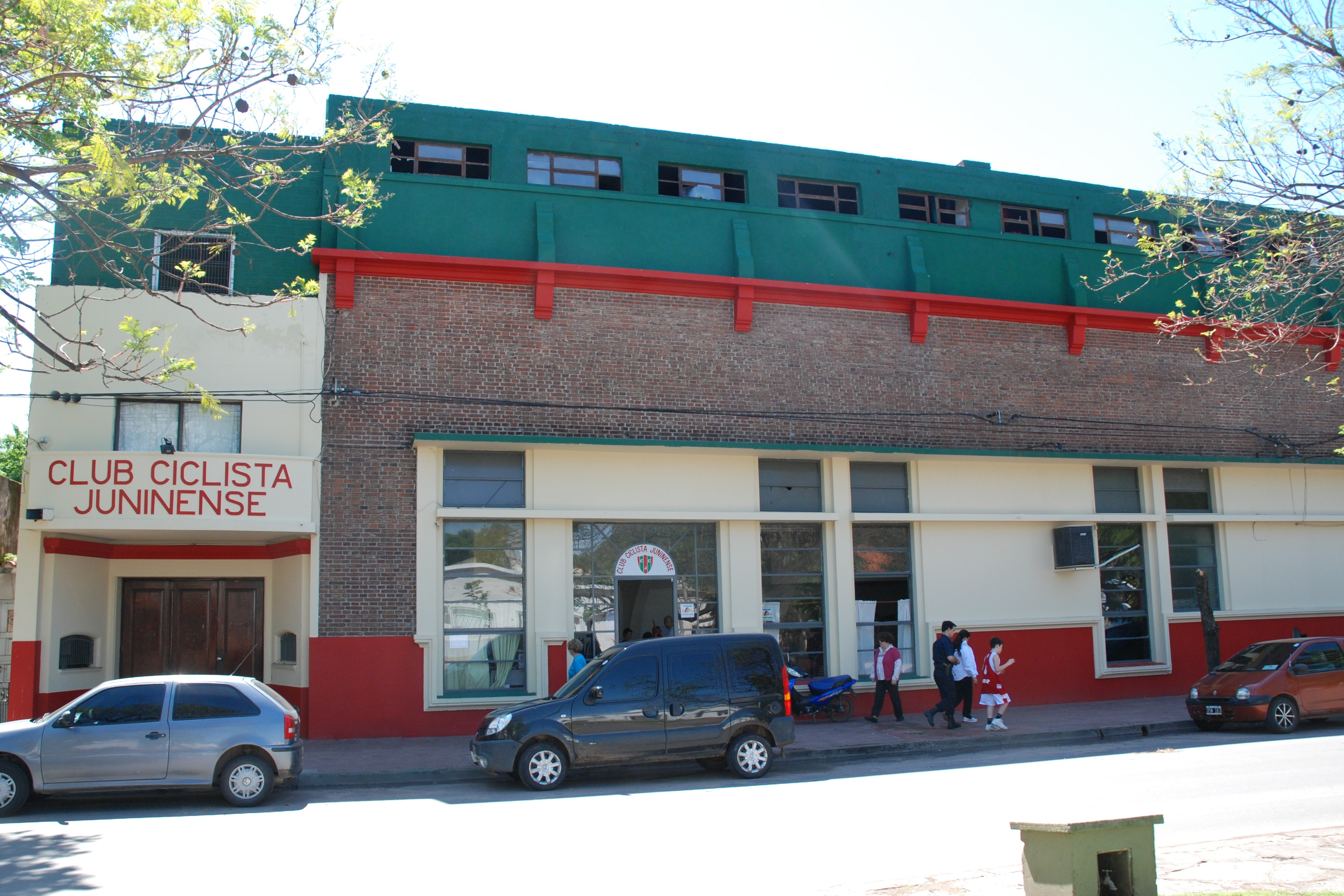 Estadio Coliseo del Boulevard Raúl Chuni Merlo, del Club Ciclista. Avenida San Martín entre Borges y Sarmiento, Junín, Argentina.